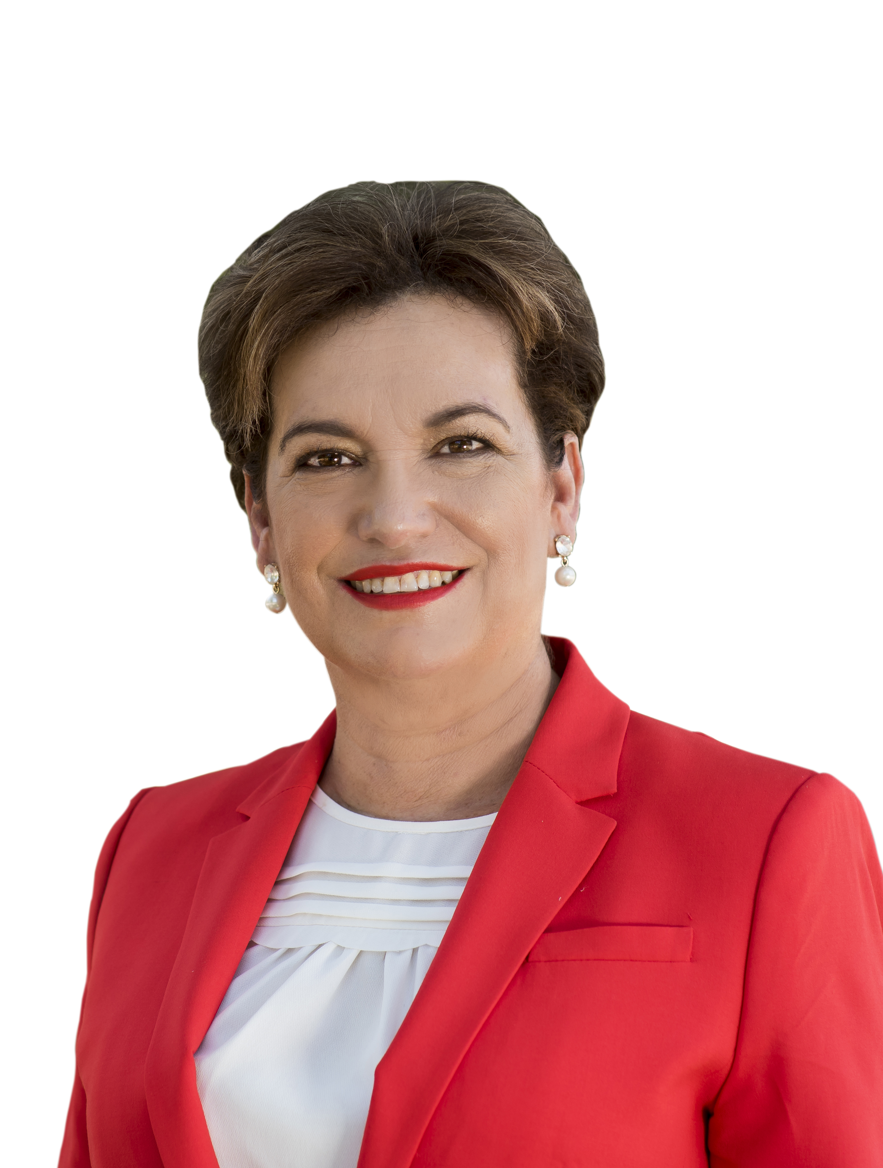 Coordinadora Estatal de Movimiento Ciudadano Sonora y Diputada local